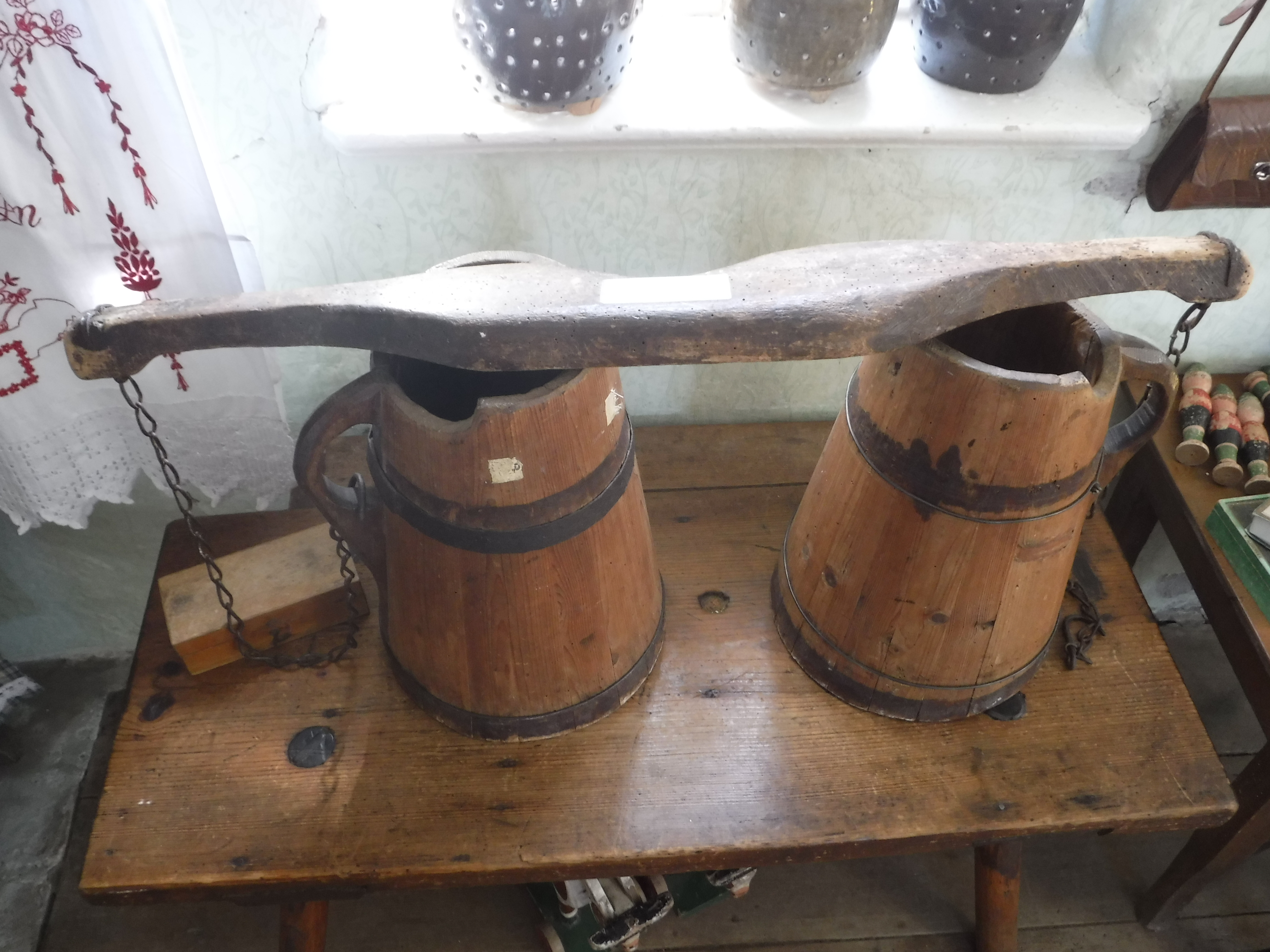 Tragjoch mit Eimern im Kleinbauernmuseum Dresden-Reitzendorf